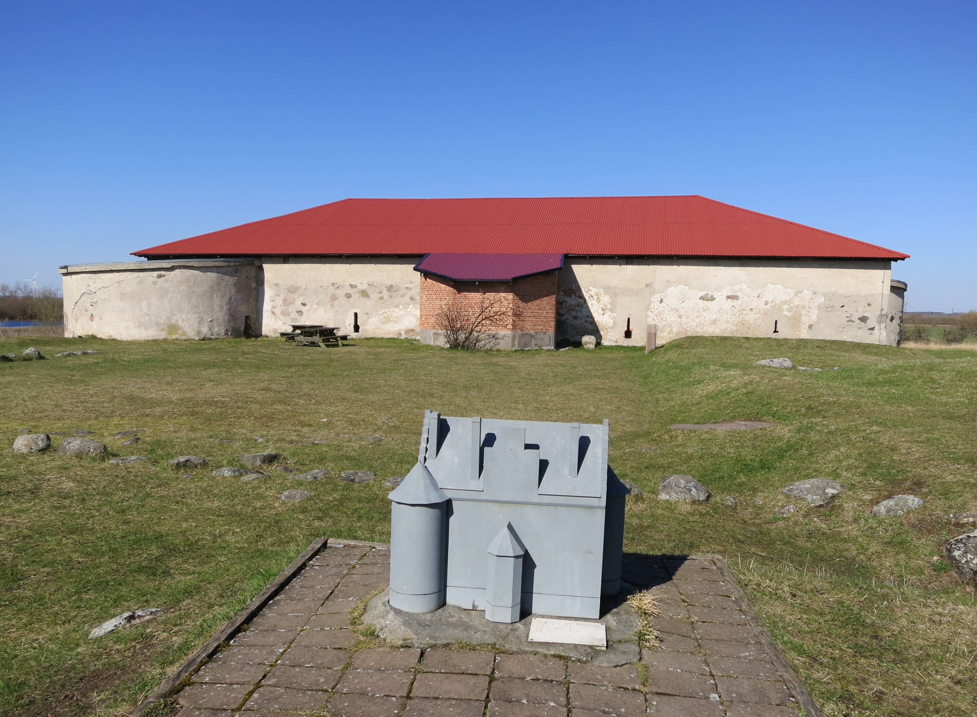 Lillö borgruin, mars 2014